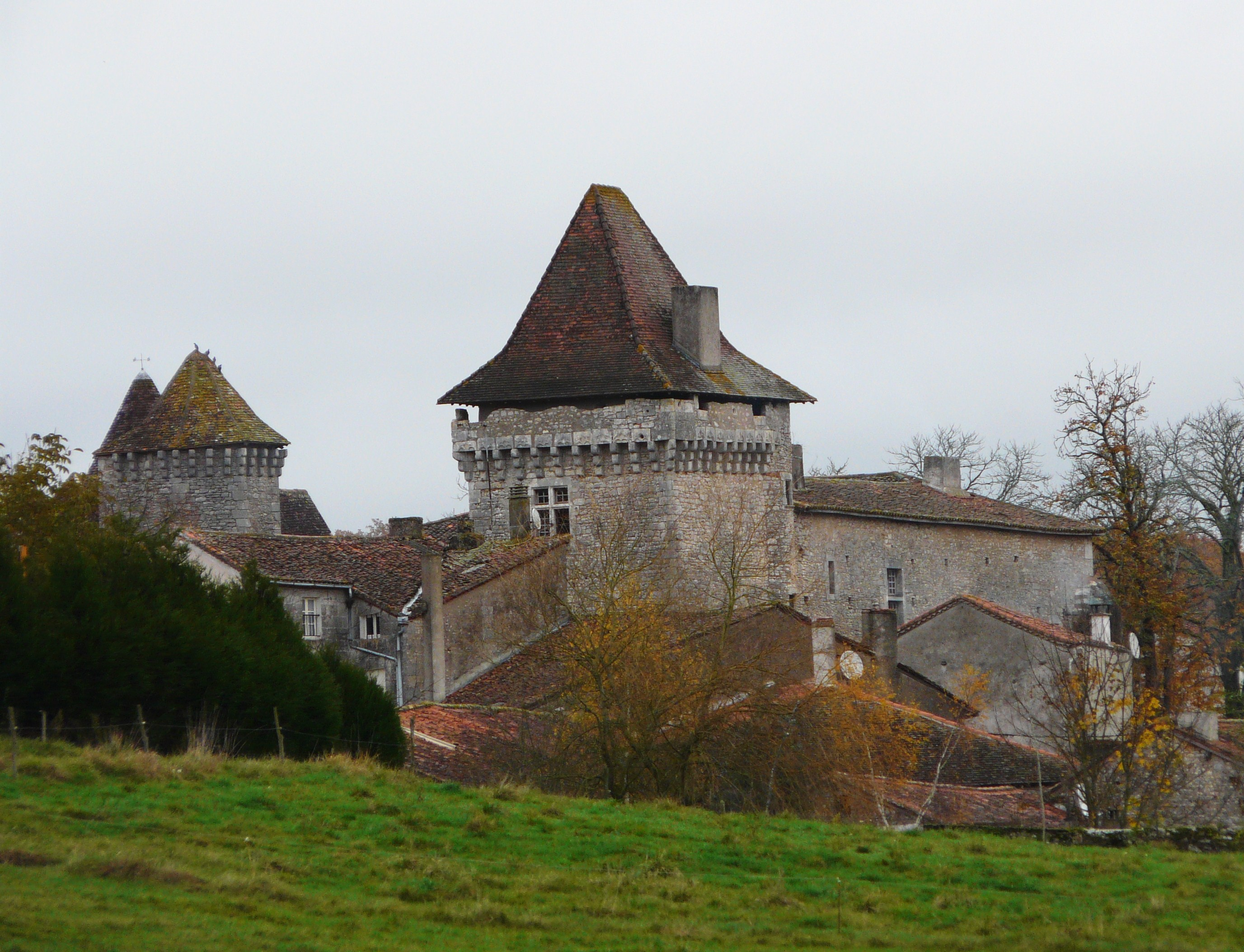 Le château de Varaignes, Dordogne, France